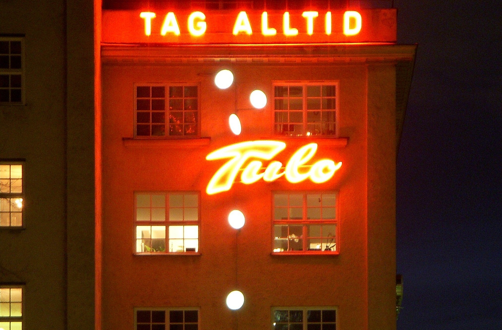 Tuloskylten 2010